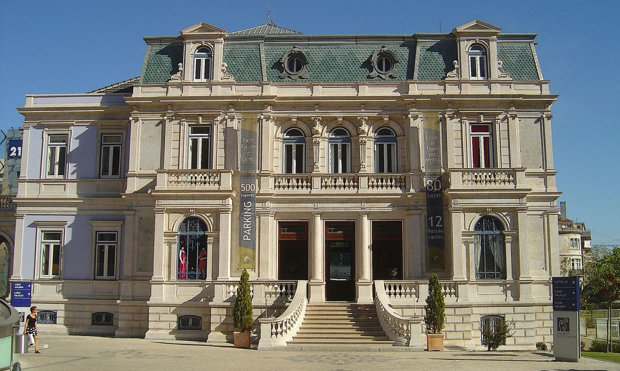 Palácio Sottomayor - Lisboa